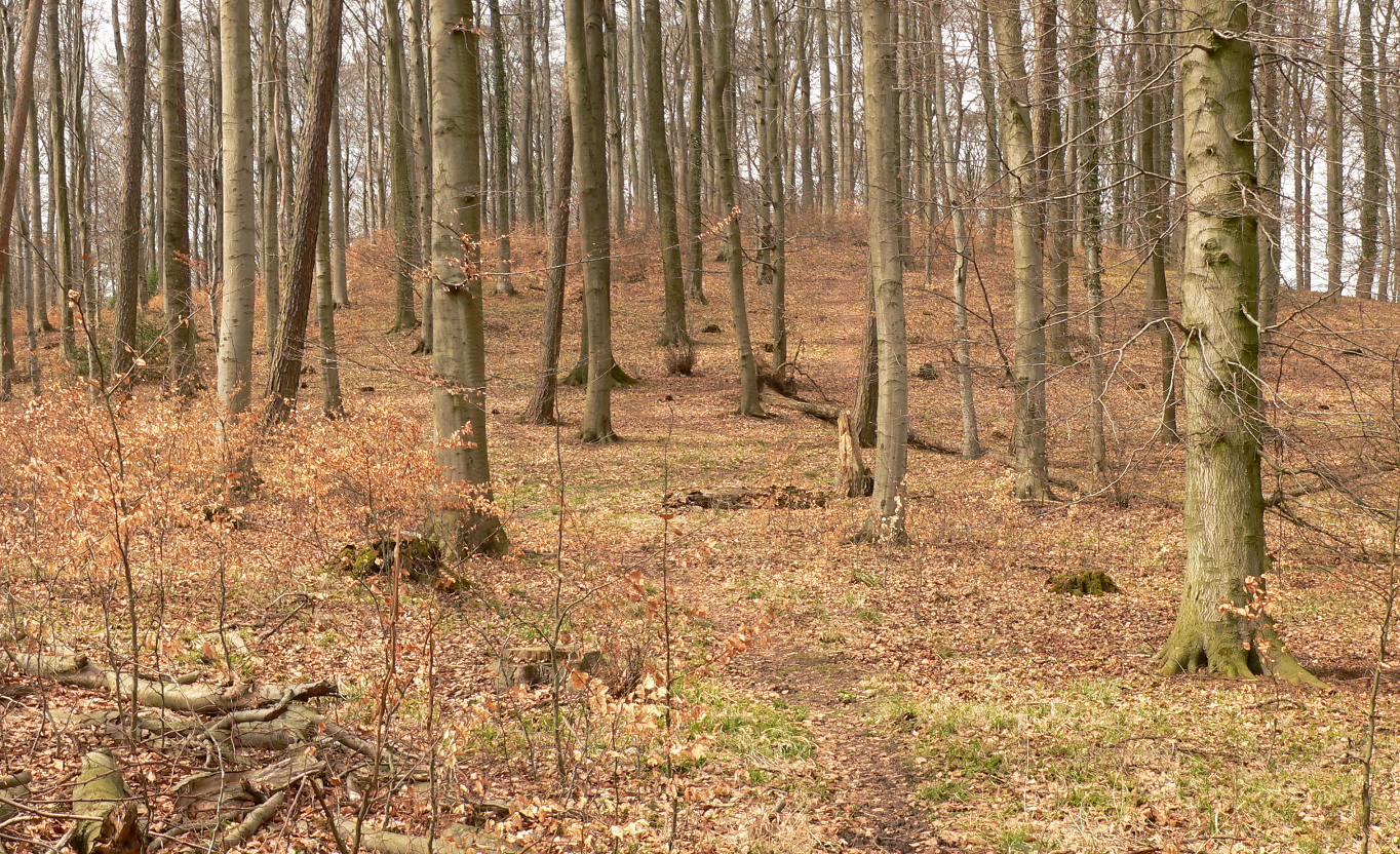 Gipfel des Süllberg